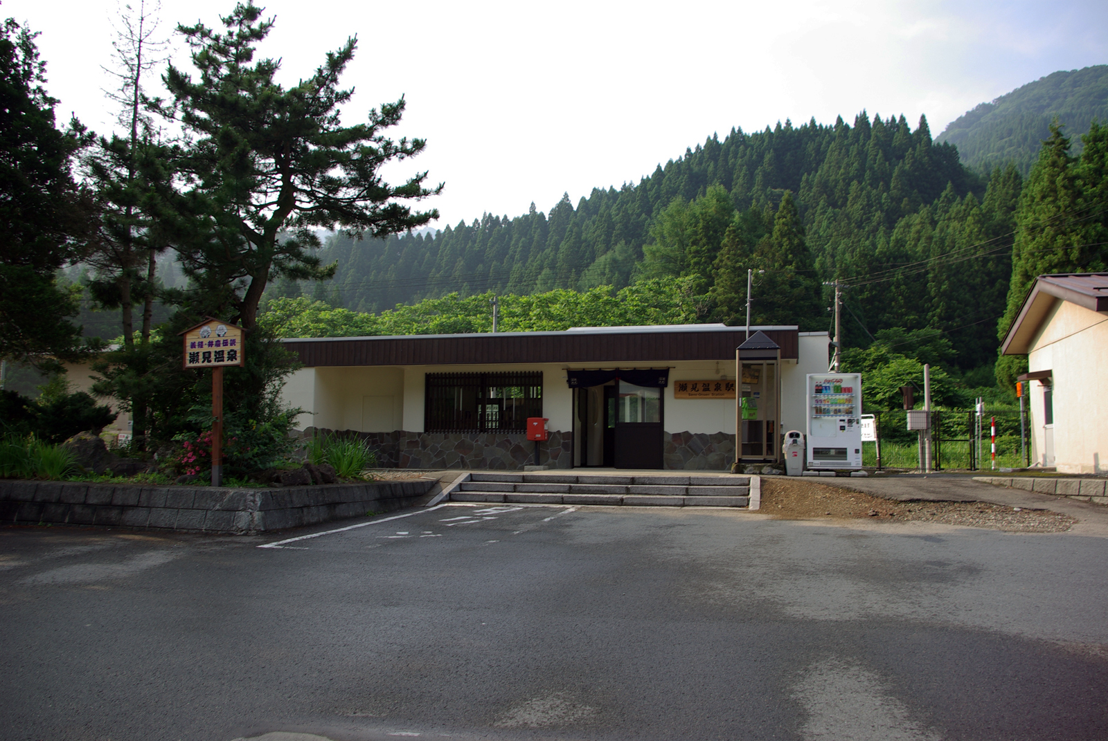 JR陸羽東線瀬見温泉駅